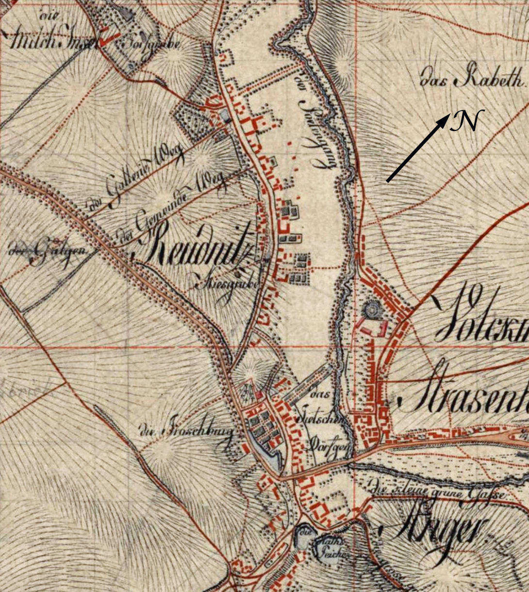 Reudnitz 1802, Ausschnitt aus Meilenblätter von Sachsen